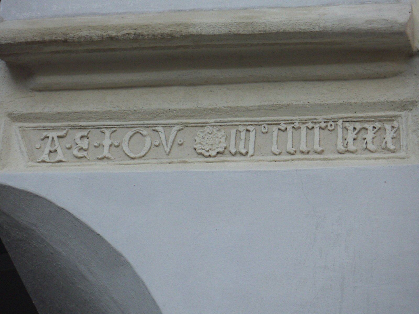 A.E.I.O.U. Inscription at the Steiner Tor in Krems (AUT) / A.E.I.O.U. Schriftzug am Steiner Tor in Krems